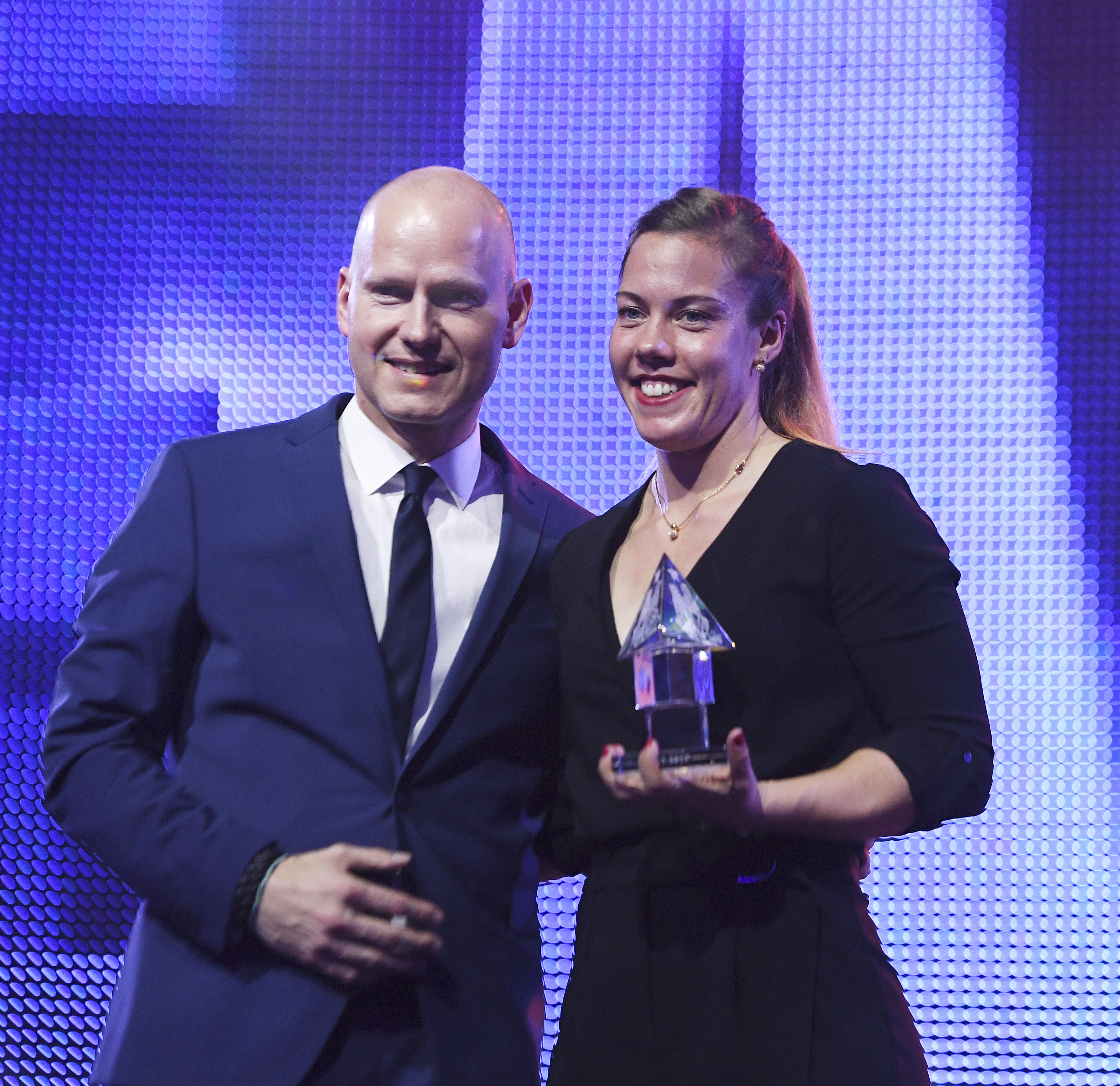 Davos, 24.11.2017. Sport, 14. Internationale Sportnacht Davos 2017. Adrian Grossholz (li), CEO des Hauptsponsors Voegele Shoes, und Kristall-Preistraegerin Jeannine Gmelin (re, Rudern). Copyright by: foto-net / Kurt Schorrer